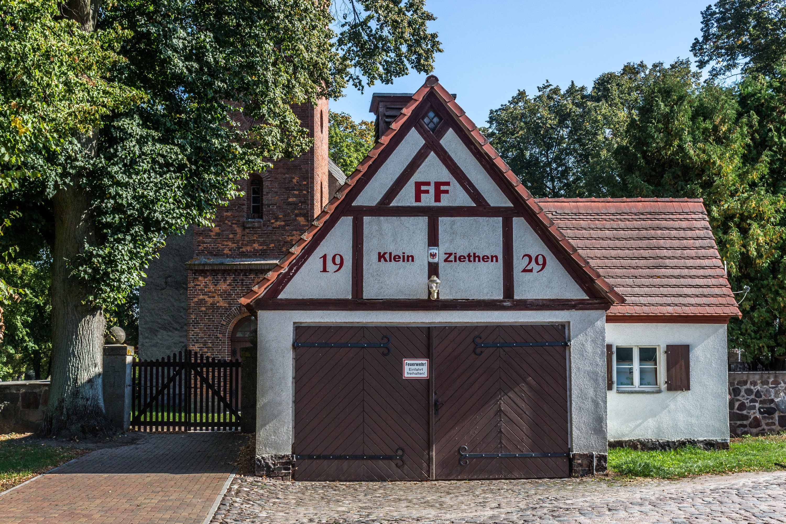 Spritzenhaus Klein-Ziethen